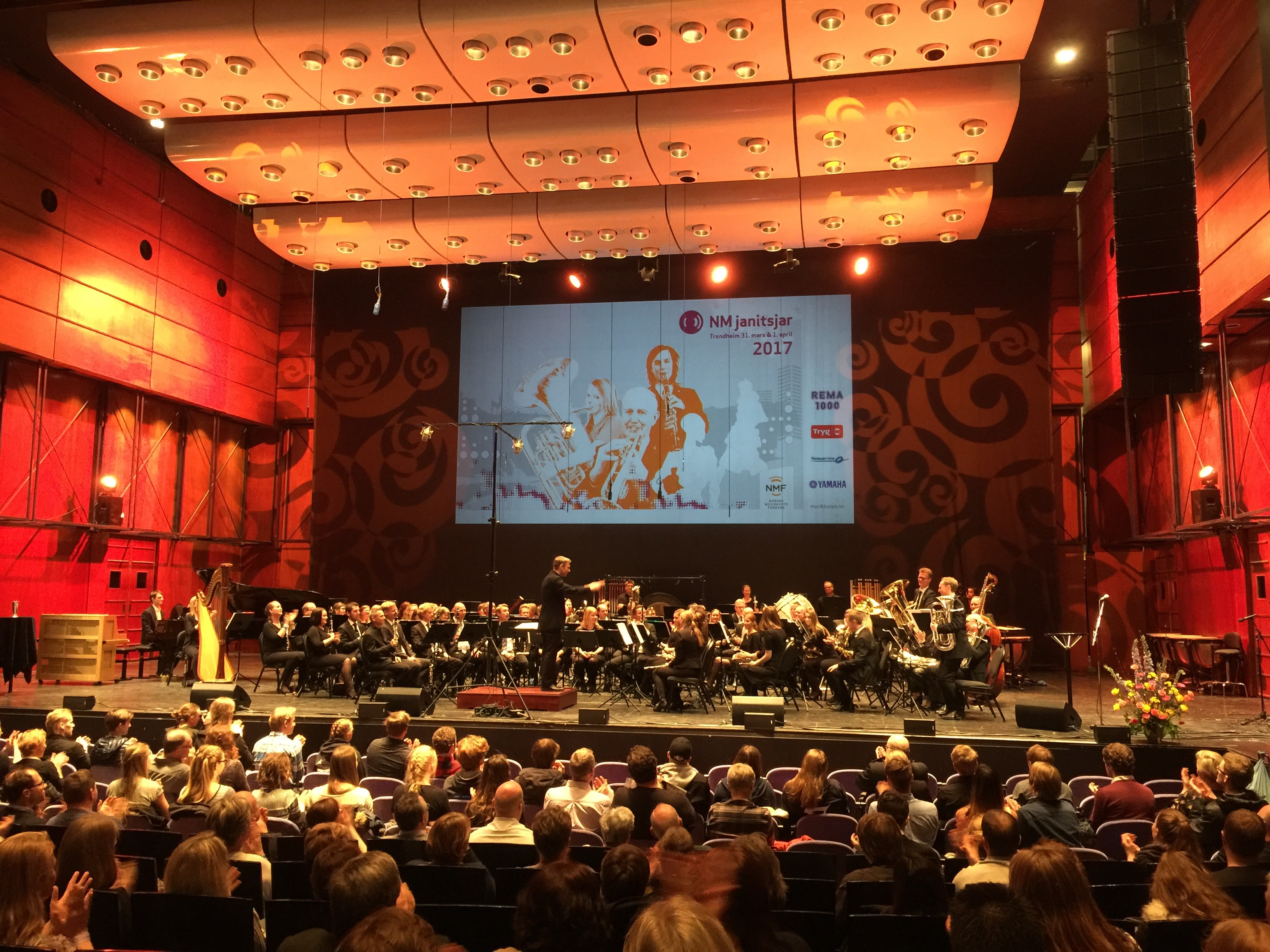 NM janitsjar 2017